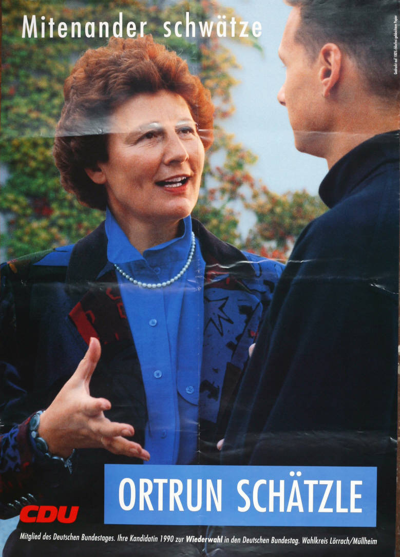 Mitenander schwätze CDU Ortrun Schätzle Mitglied des Deutschen Bundestages. Ihre Kandidatin 1990 zur Wiederwahl in den Deutschen Bundestag. Wahlkreis Lörrach/MüllheimAbbildung:Ortrun Schätzle im Gespräch mit einem MannPlakatart:Kandidaten/Personenplakat mit Drucker_Druckart_Druckort:Gedruckt auf 100% chlorfrei gebleichtem PapierObjekt-Signatur:10-001: 3549Bestand:Plakate zu Bundestagswahlen (10-001)GliederungBestand10-18:Plakate zu Bundestagswahlen (10-001) » Die 12. Bundestagswahl am 2. Dezember 1990 » CDU » Mit PorträtfotoLizenz:KAS/ACDP 10-001: 3549 CC-BY-SA 3.0 DE